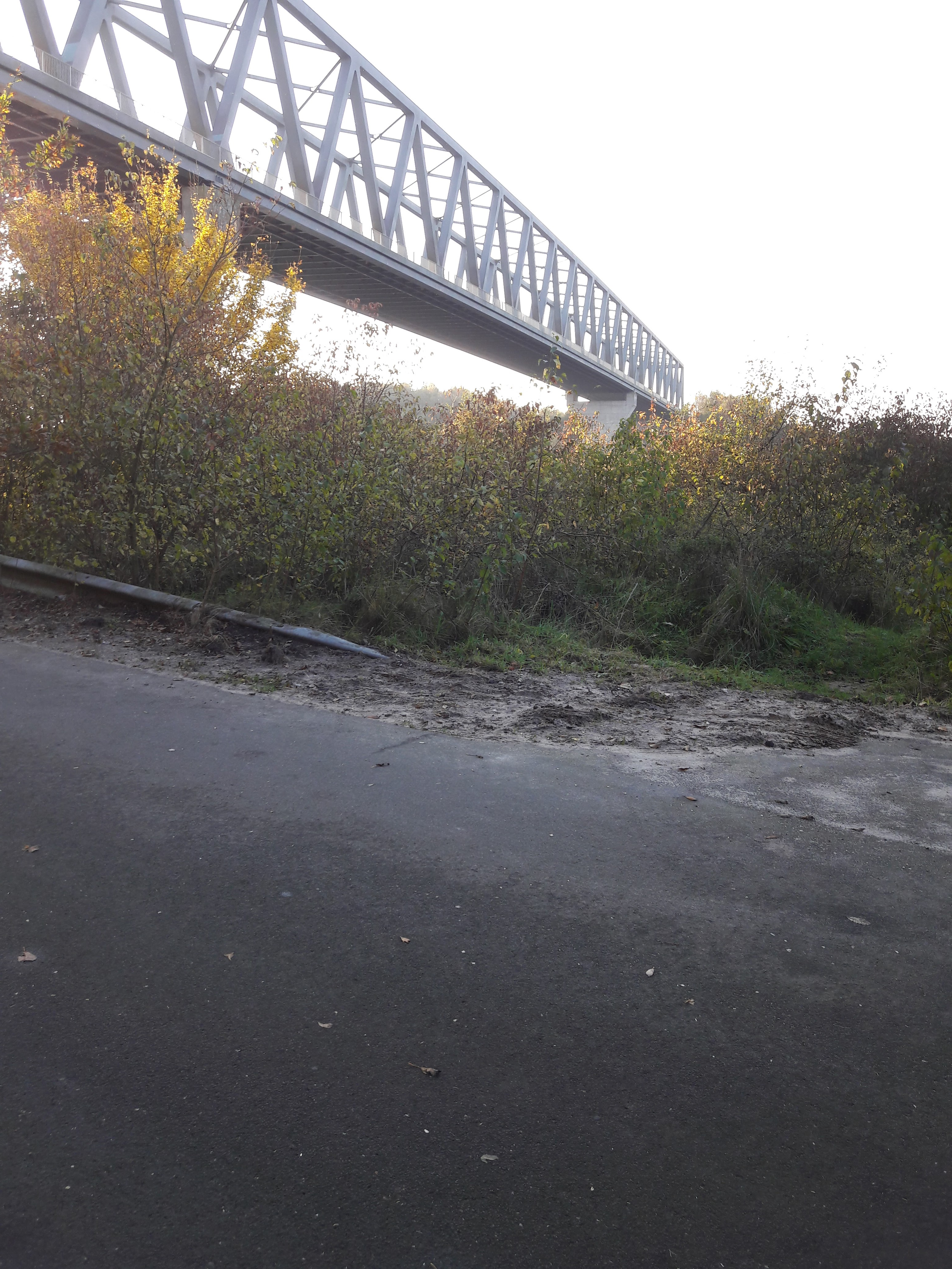 Am Kanal, Beldorf